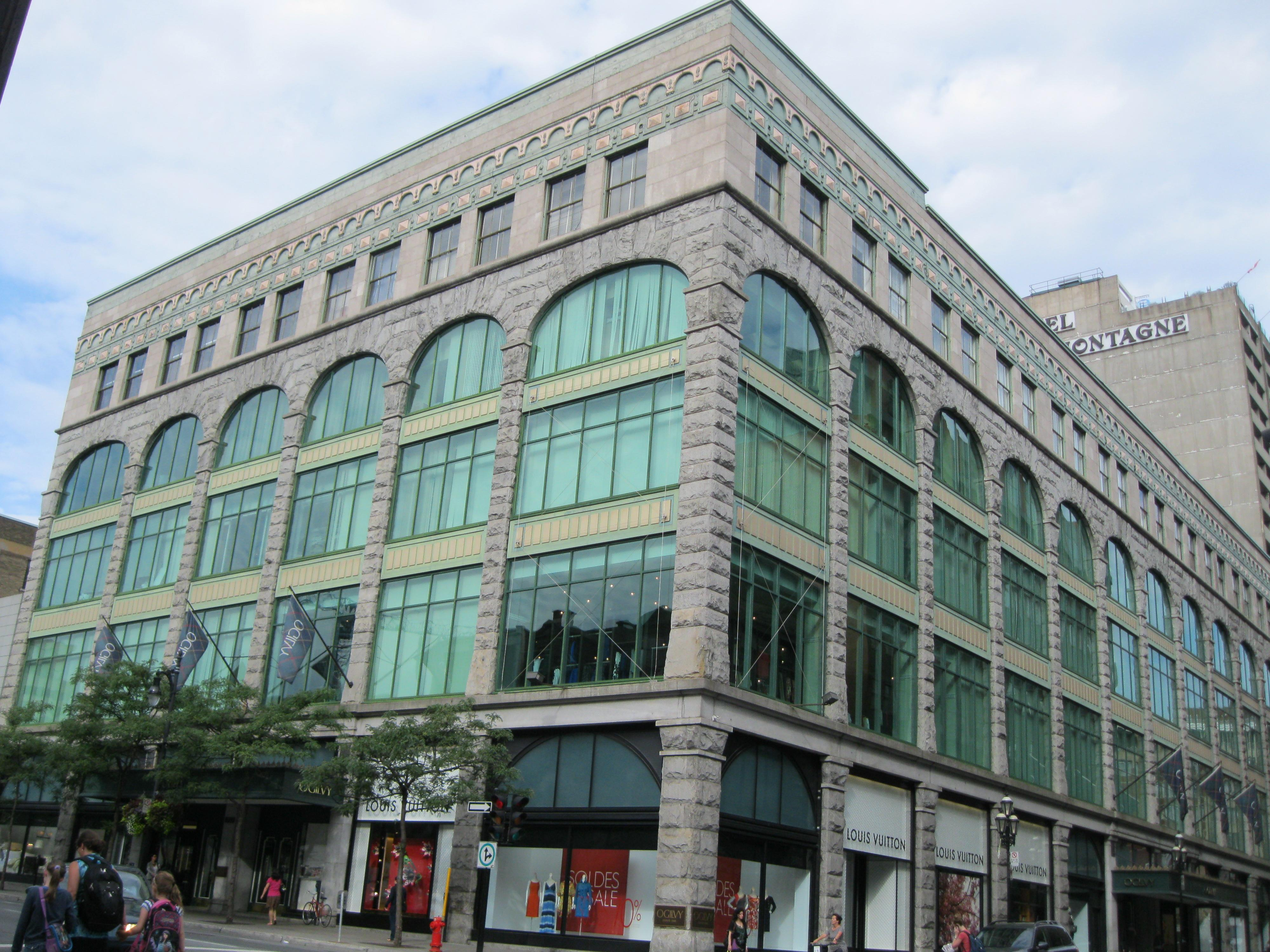 Ogilvy, 1307, rue Sainte-Catherine Ouest, Montréal